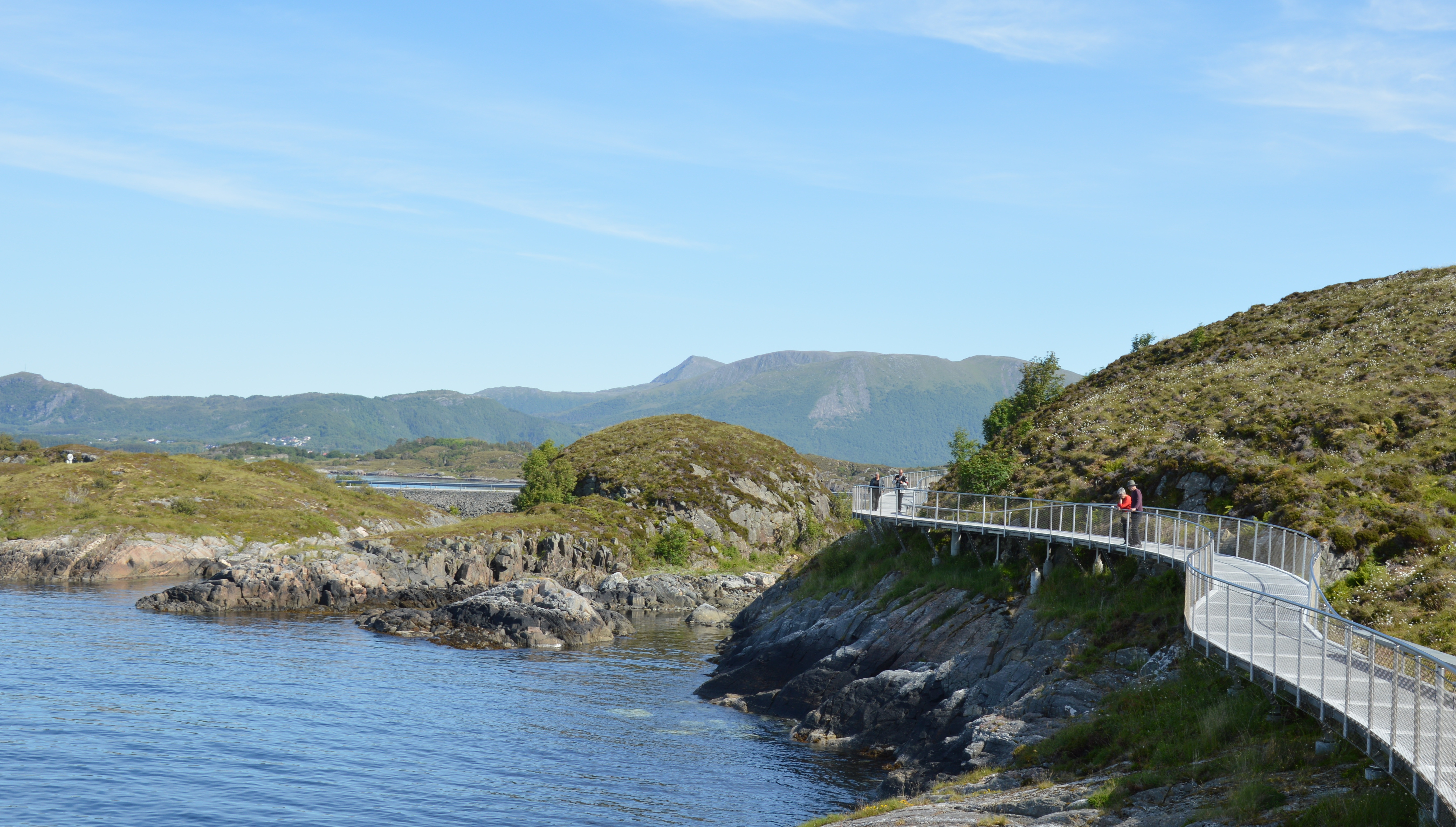 Lyngholmen